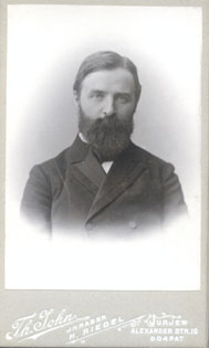 Alexander Berendts